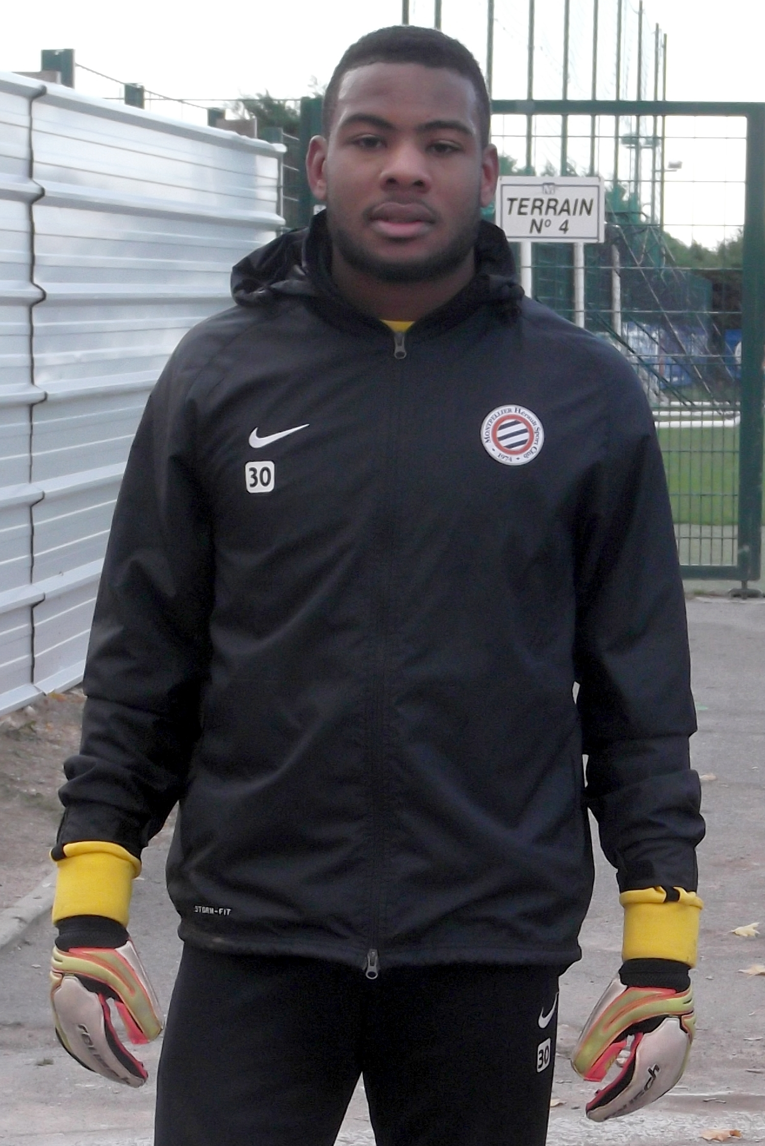 Jonathan Ligali, fin d'entrainement..